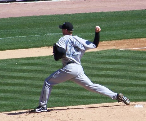 Roy Halladay